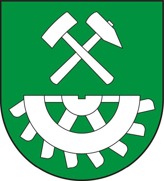 Herb gminy Smyków.